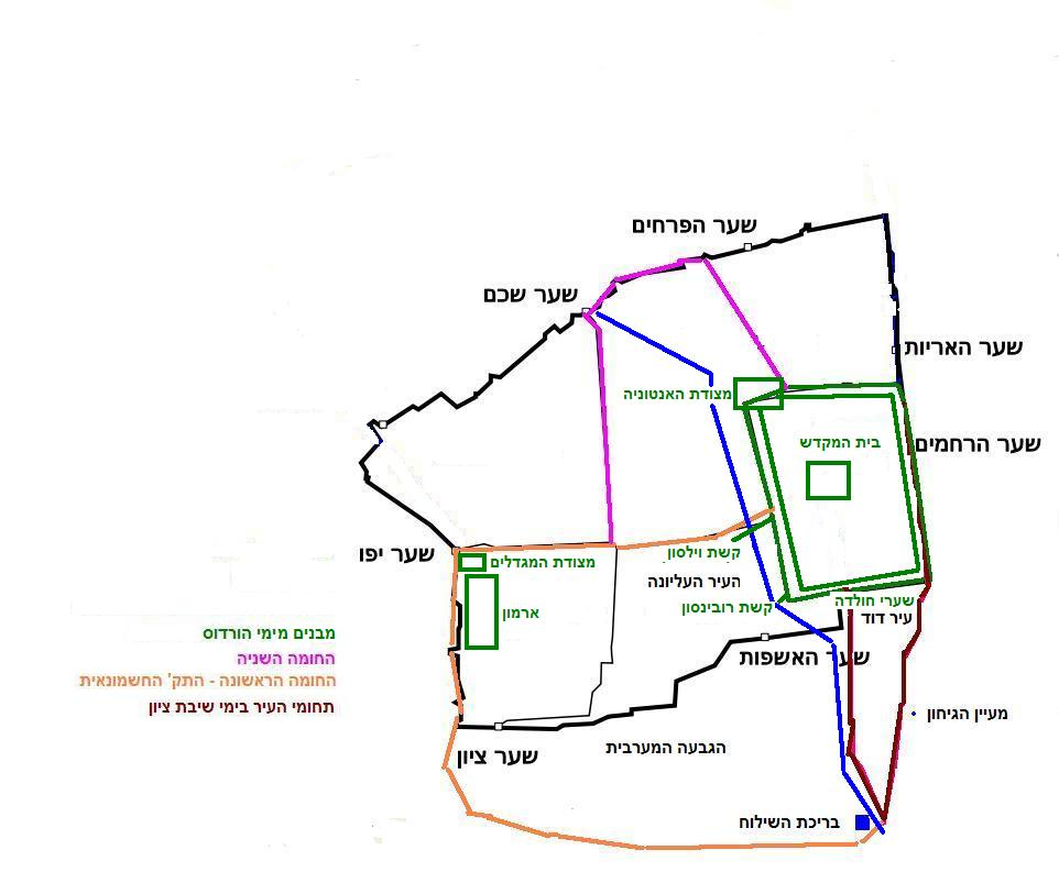 ישורלים ההרודיאנית רישיון נוצר על ידי משתמש:Ranbar